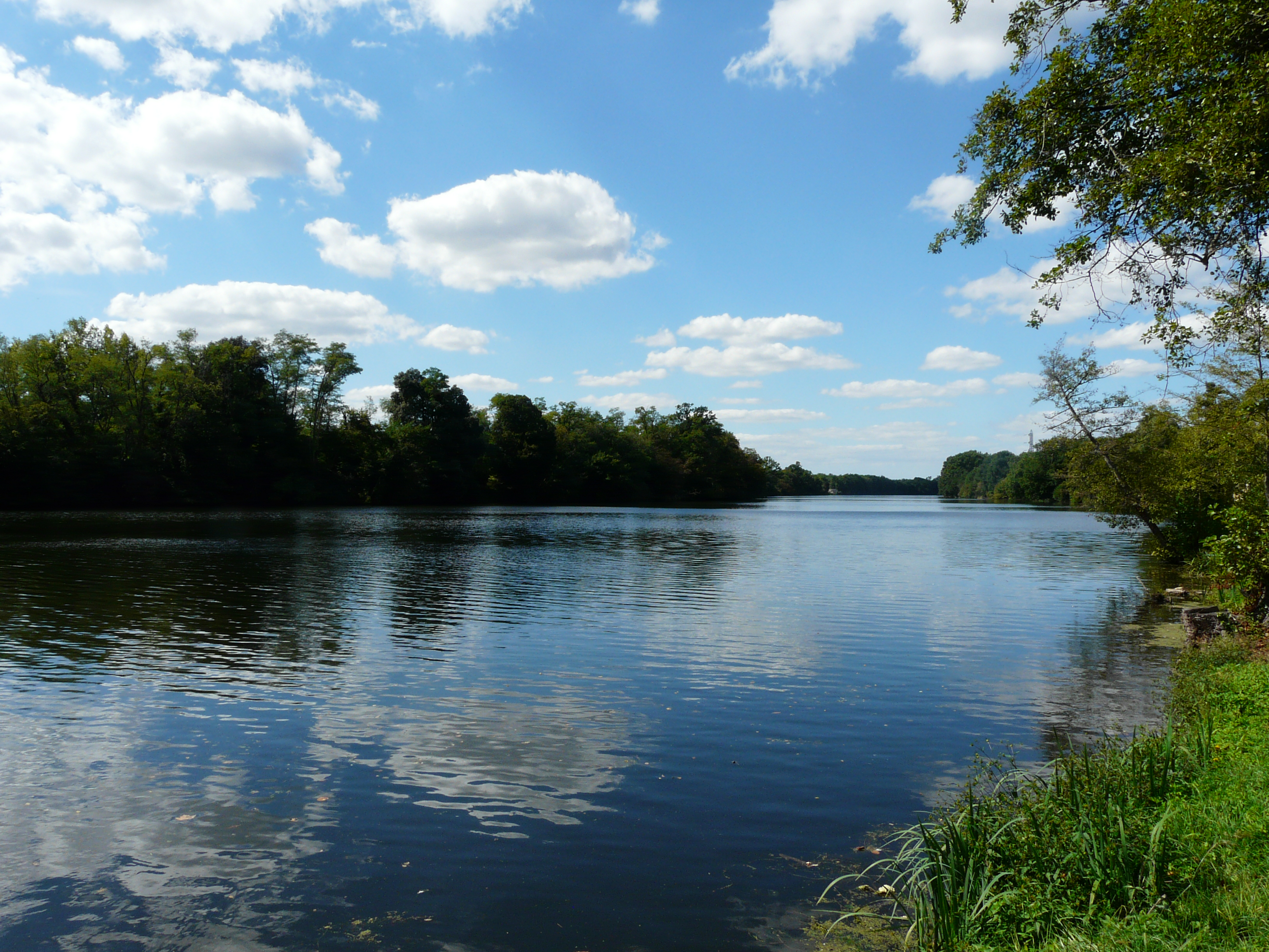 La Dordogne en aval du bourg de Saint-Capraise-de-Lalinde, Dordogne, France. Elle sert de limite entre Varennes à gauche et Saint-Capraise-de-Lalinde à droite.